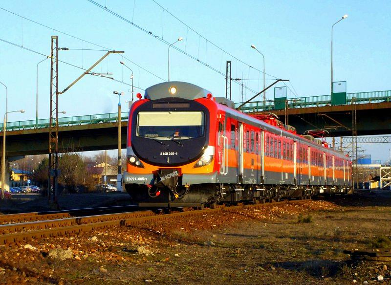 Elektryczny zespół trakcyjny ED72A-004 w okolicach stacji Trzebinia.